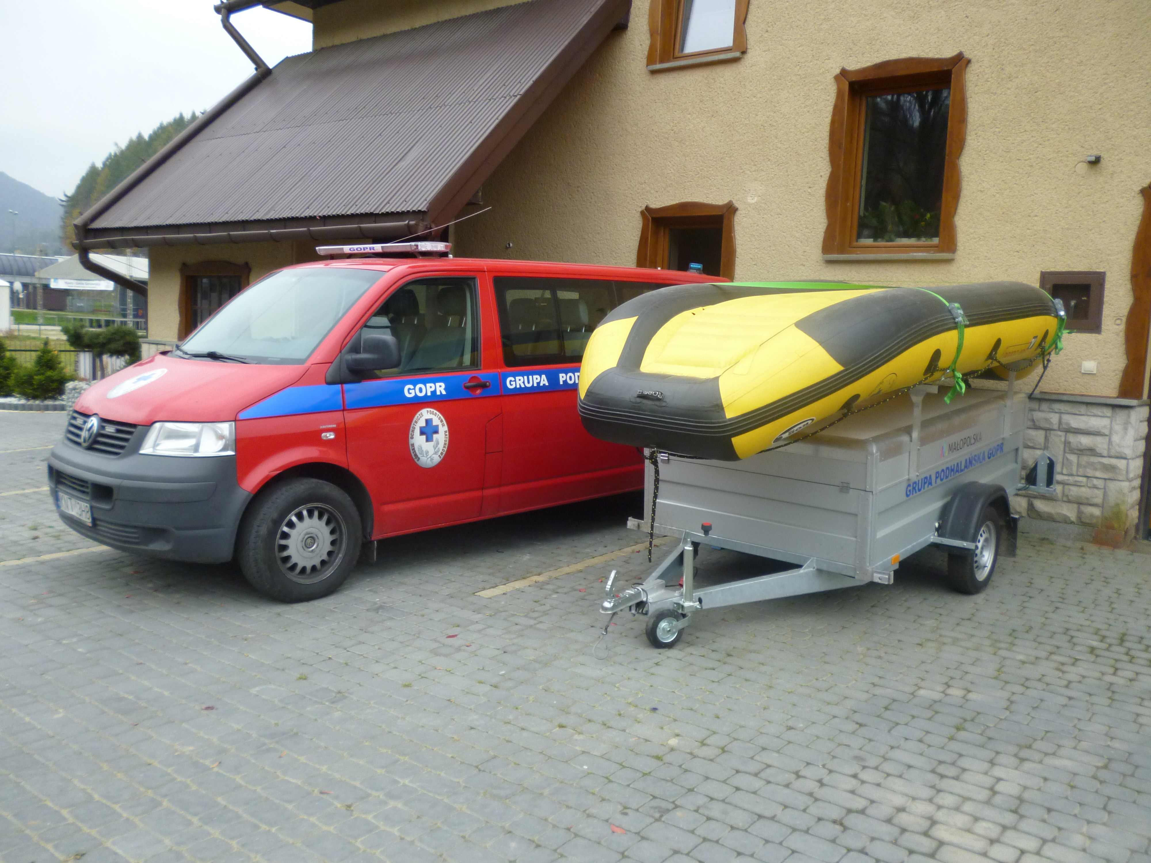 Samochód oraz ponton do ratownictwa na górskich rzekach, na wyposażeniu Grupy Podhalańskiej GOPR w Szczawnicy